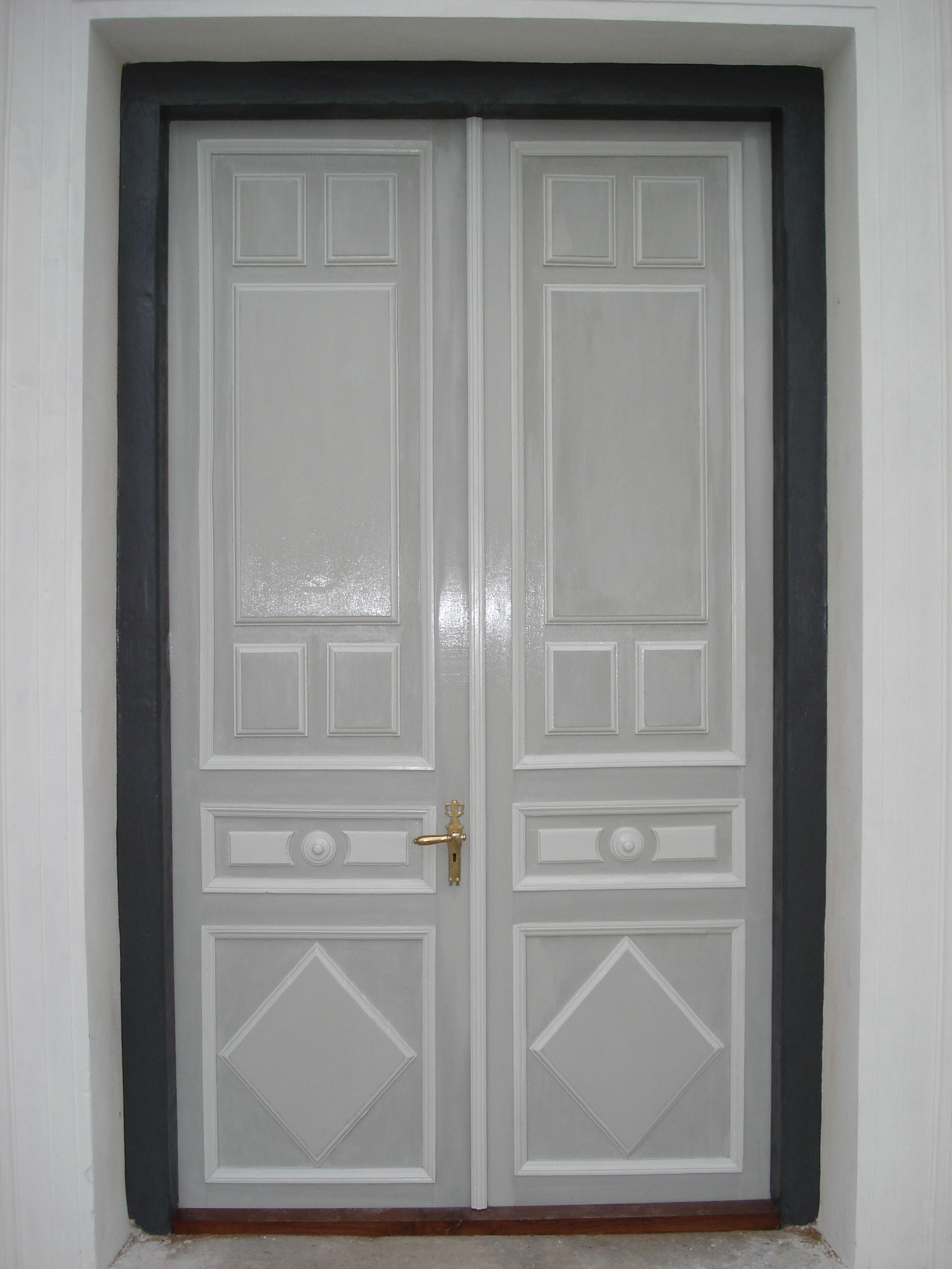 Kahepoolsete uste vahelist pilu katab tuuleliist.